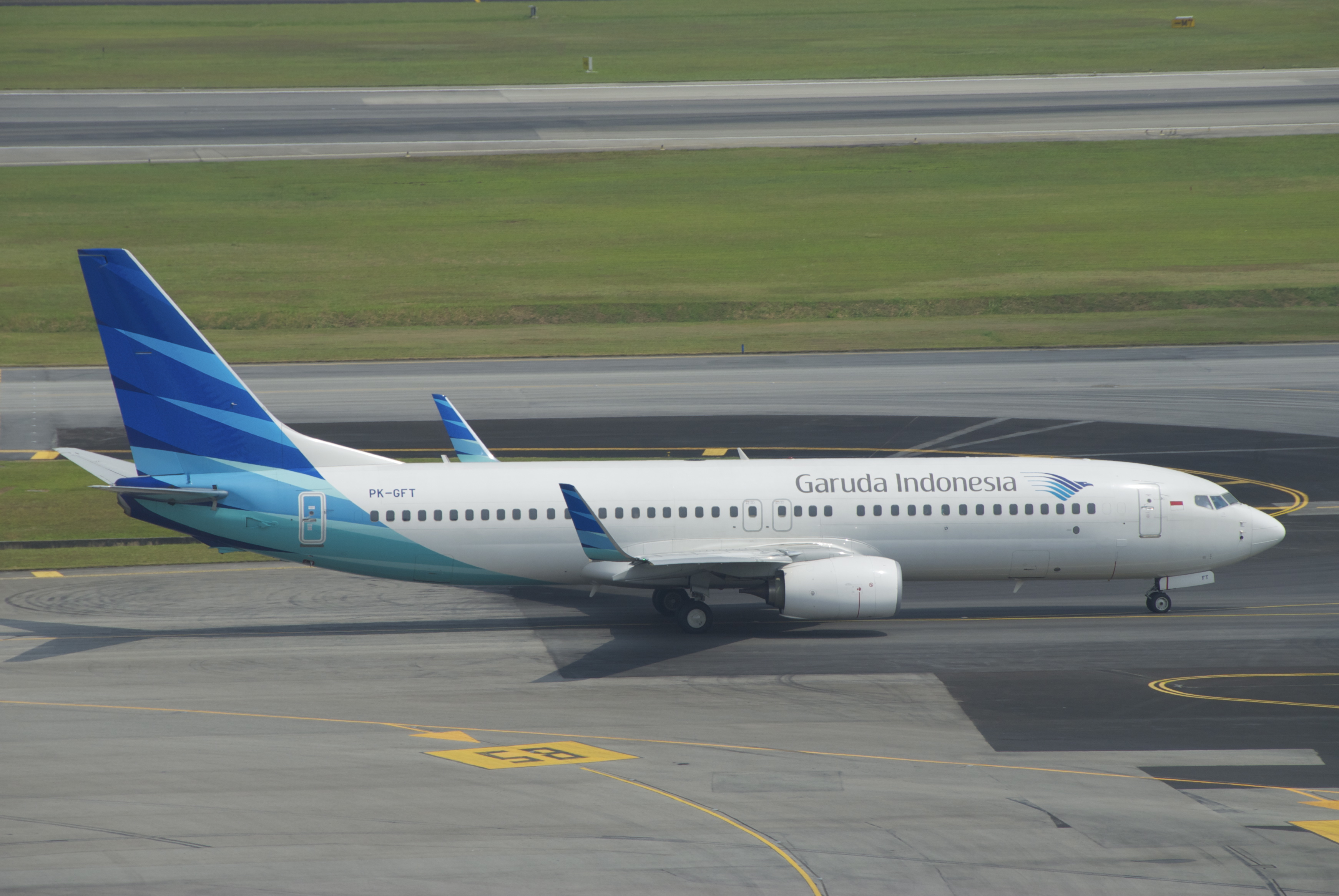 Garuda Indonesia Boeing 737-800; PK-GFT@SIN;02.08.2012/668eb